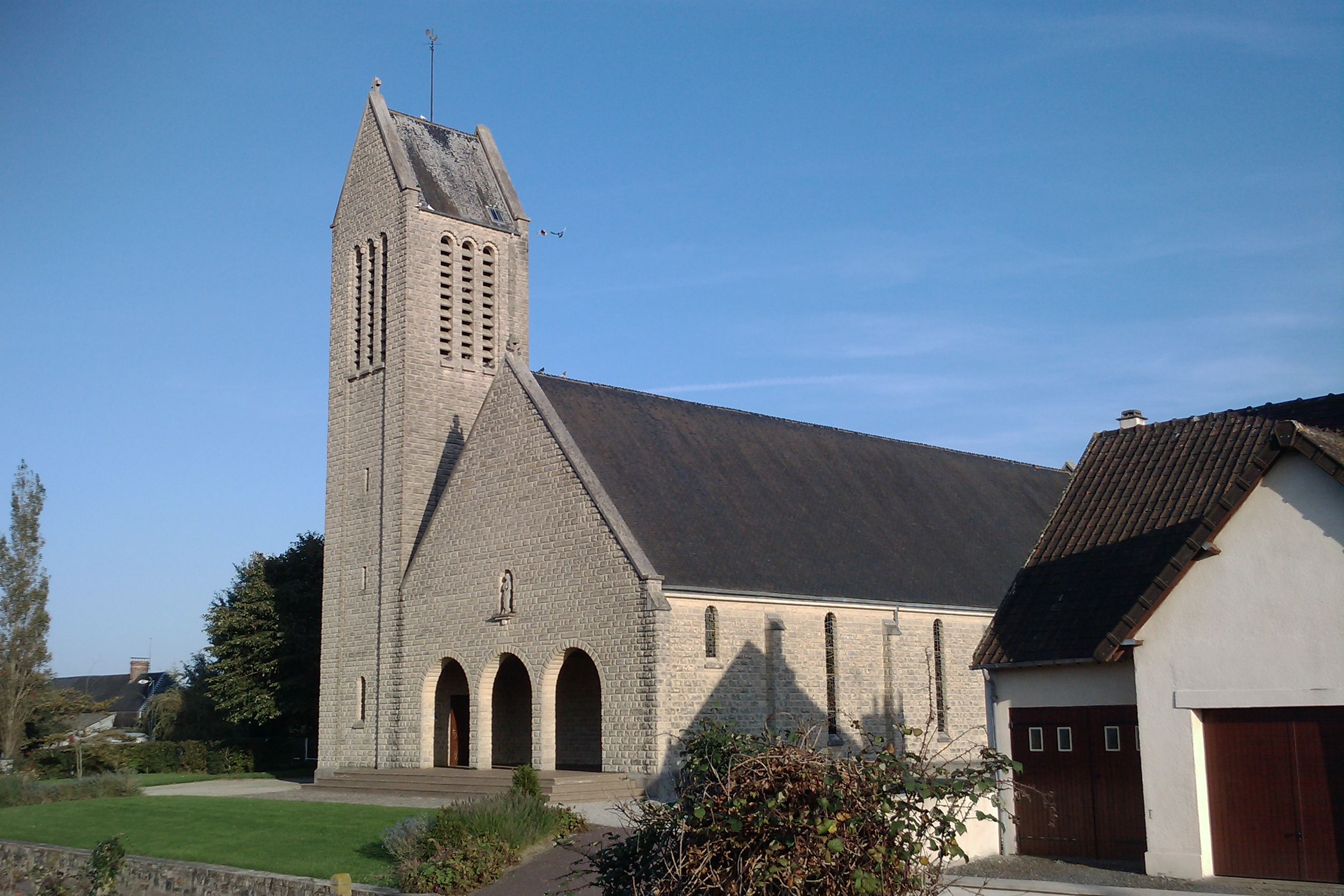 église reconstruite (à ne pas confondre avec l'ancienne partiellement détruite)